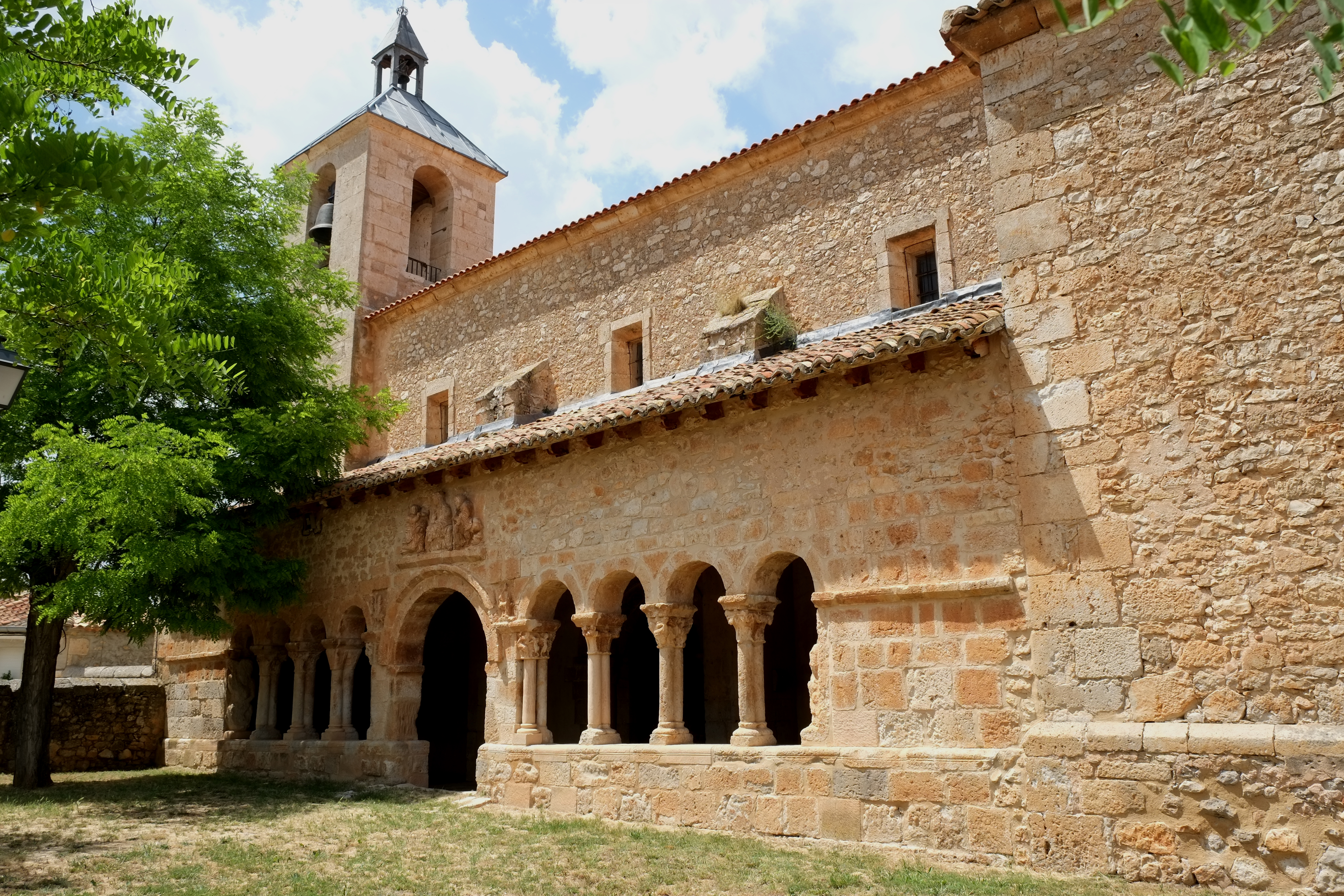 Kirche Nuestra Señora de la Asunción in Villasayas in der Provinz Soria in Kastlien-León (Spanien)